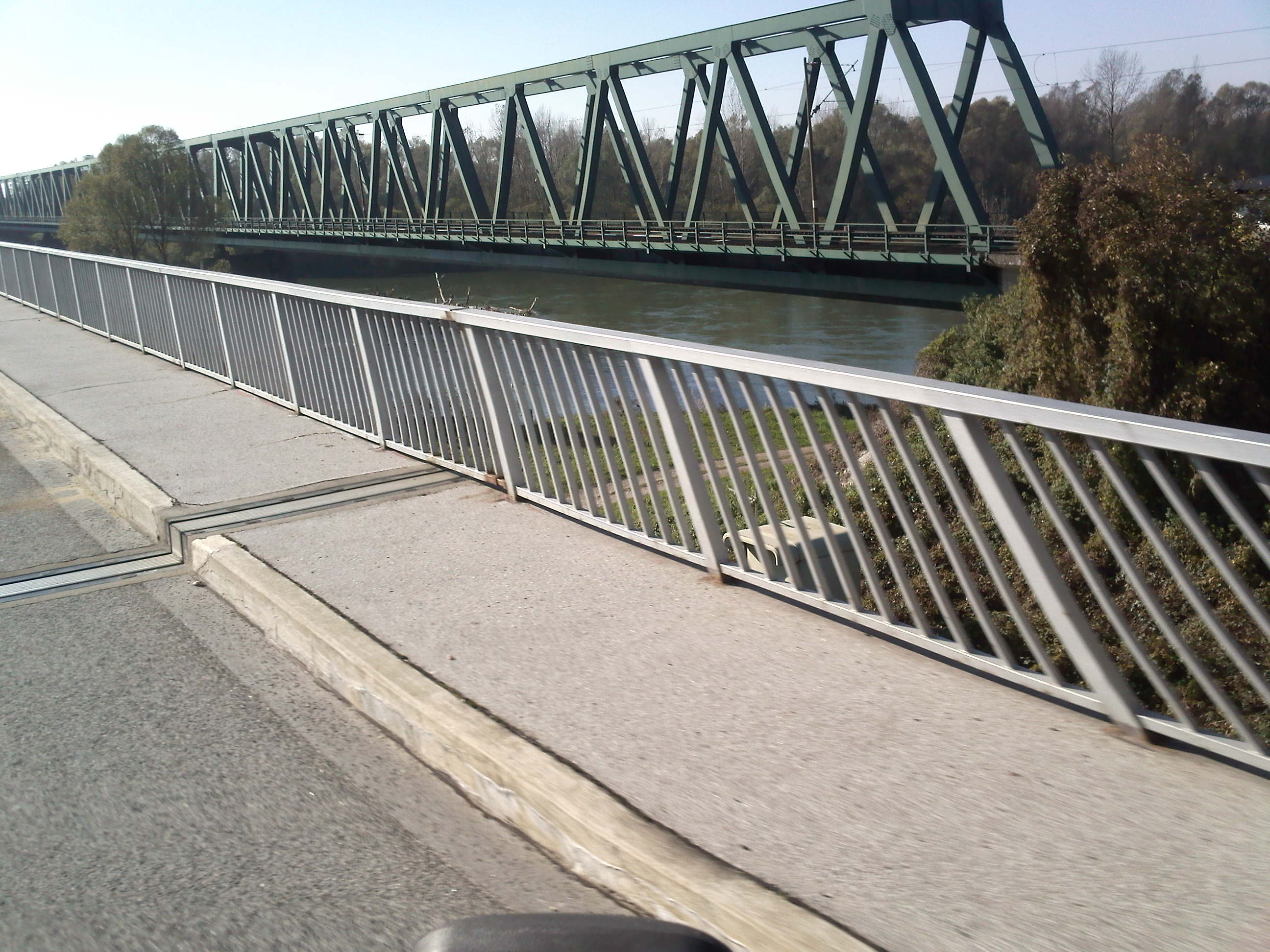 Most preko Drave